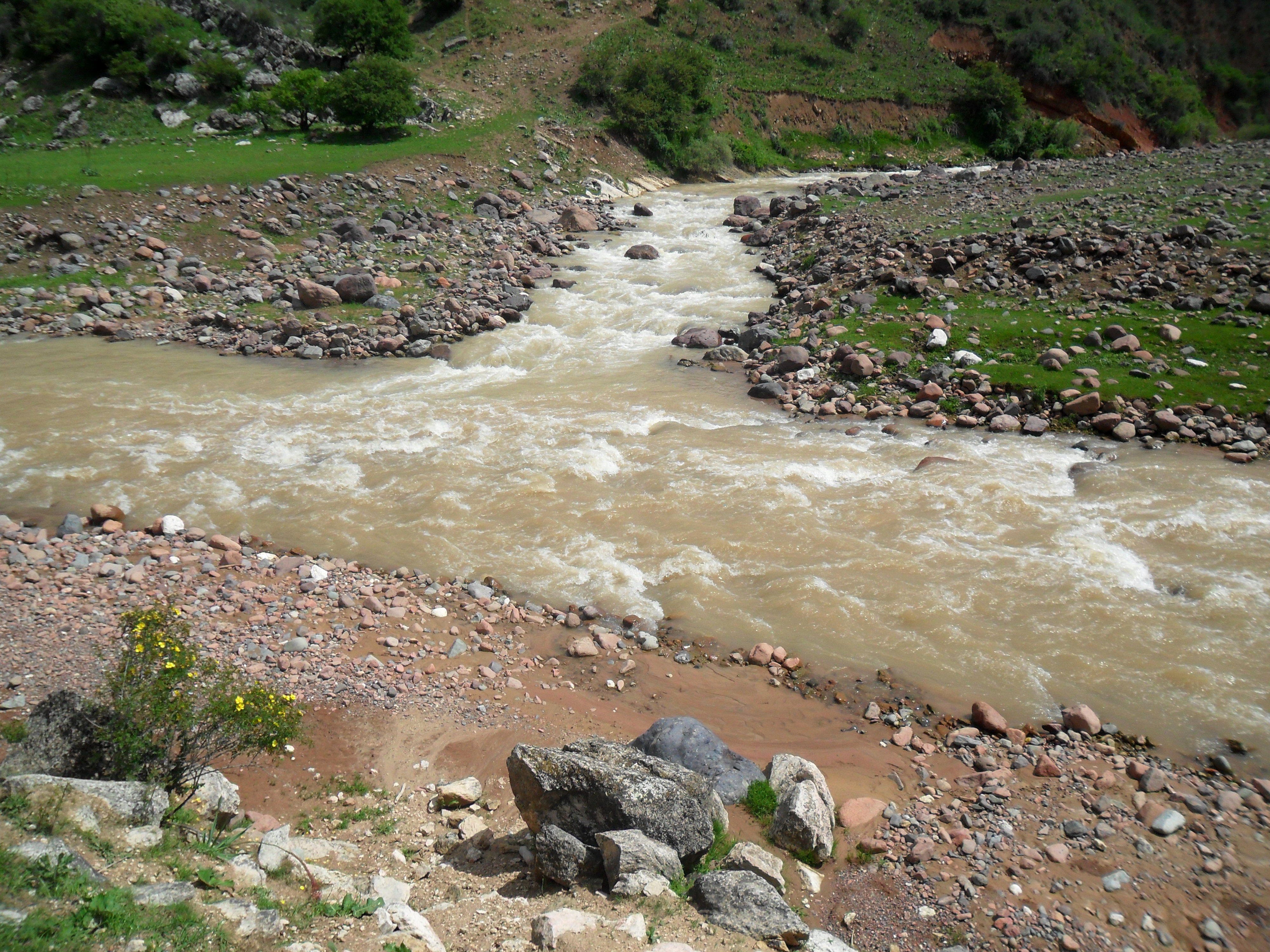 Впадение Нурекаты в Аксакату. Ташкентская область, Республика Узбекистан